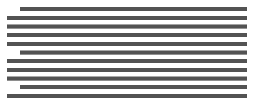 Отбивка абзацев отступом в первой строке